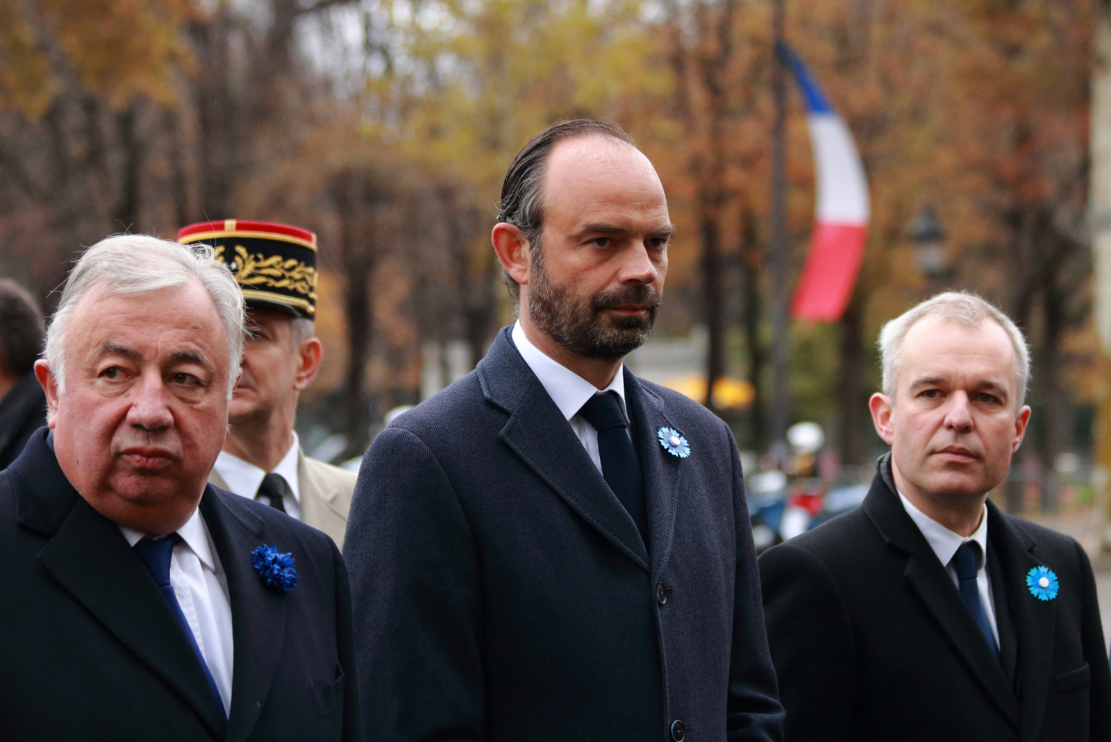 François de Rugy, Gérard Larcher et Édouard Philippe, aux cérémonies du 11 novembre 2017 à la statue Clemenceau.